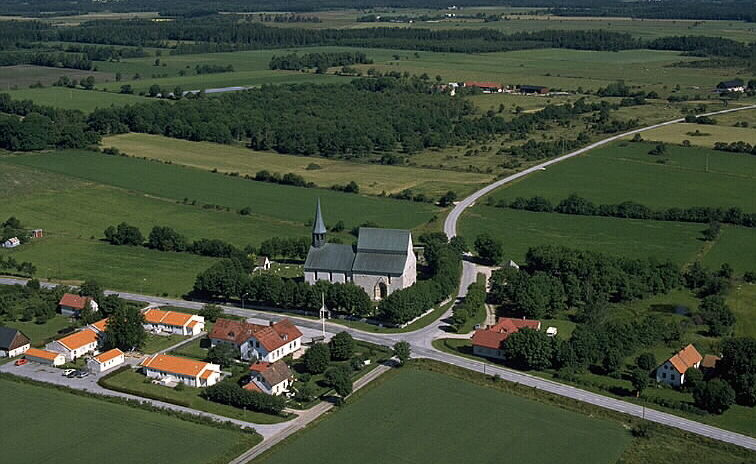 Motiv: Lau kyrka Nyckelord: Flygbilder, Riksintressen Kategori: KyrkomiljöLau kyrka